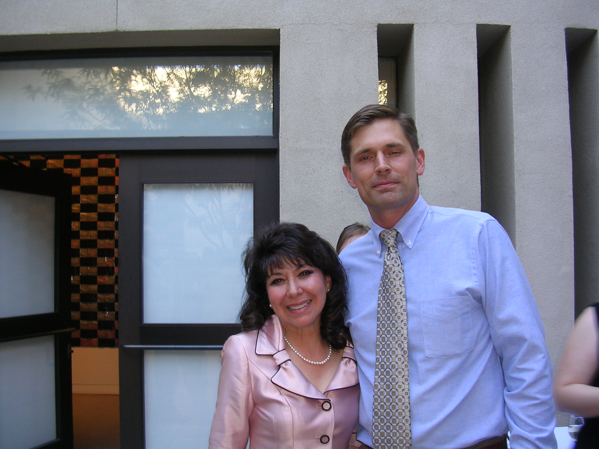 Rebecca Vigil-Giron and Martin Heinrich